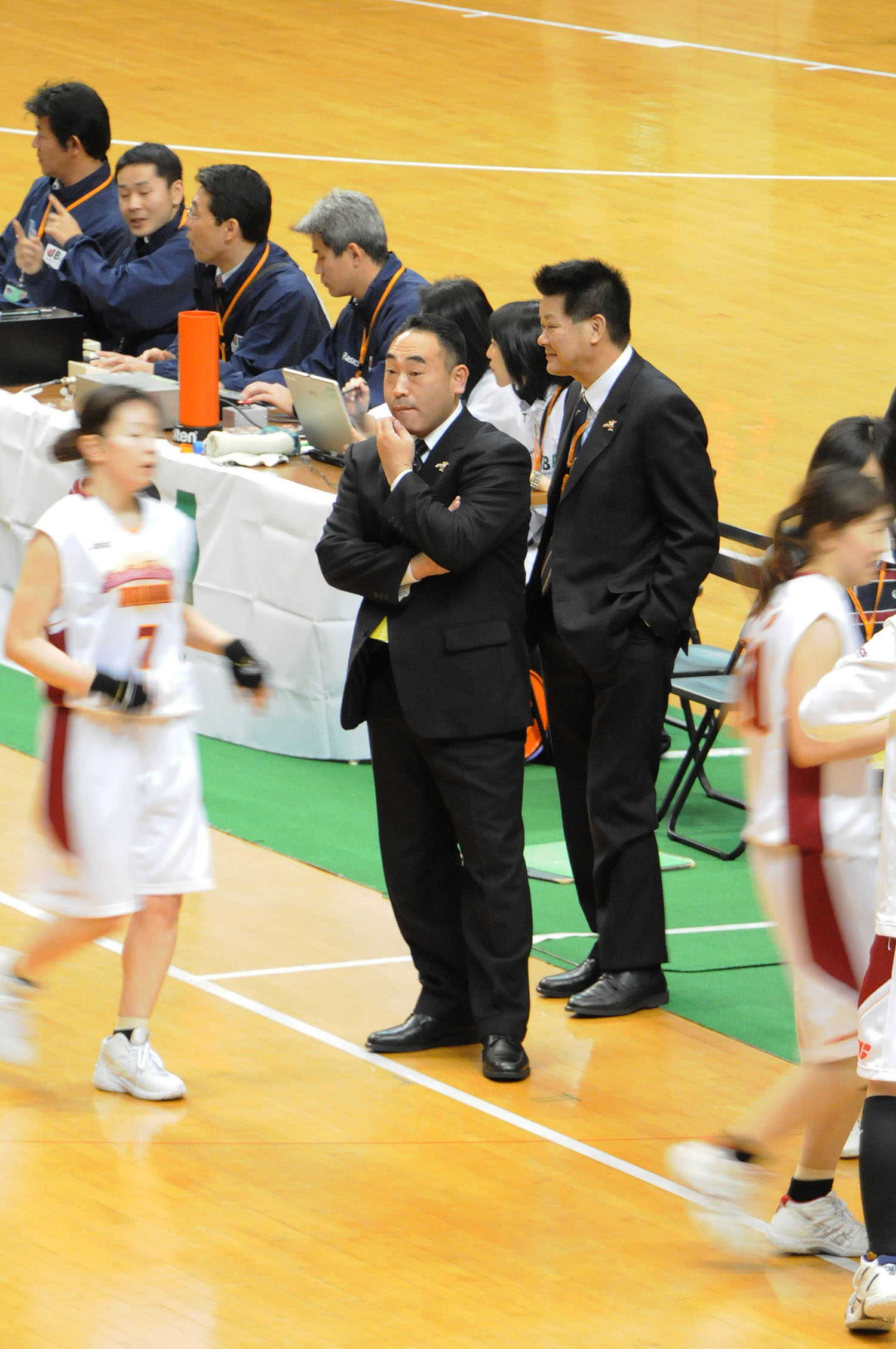 トヨタ紡織サンシャインラビッツ、佐藤満明ヘッドコーチ。東京体育館で。